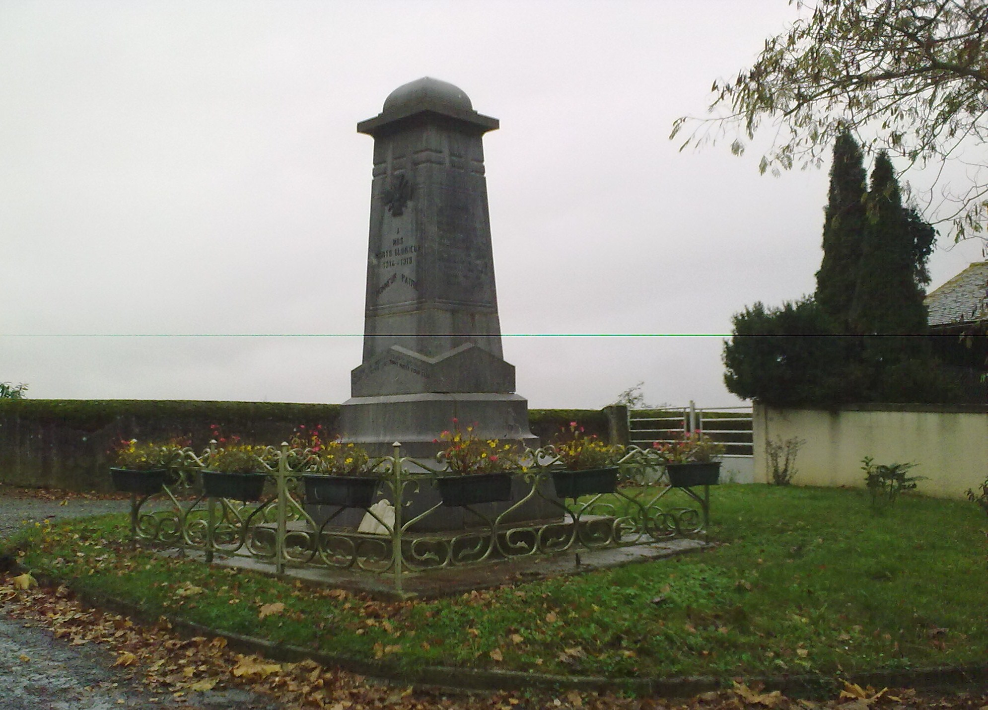 Coslédaà-Lube-Boast le 14 novembre 2010.